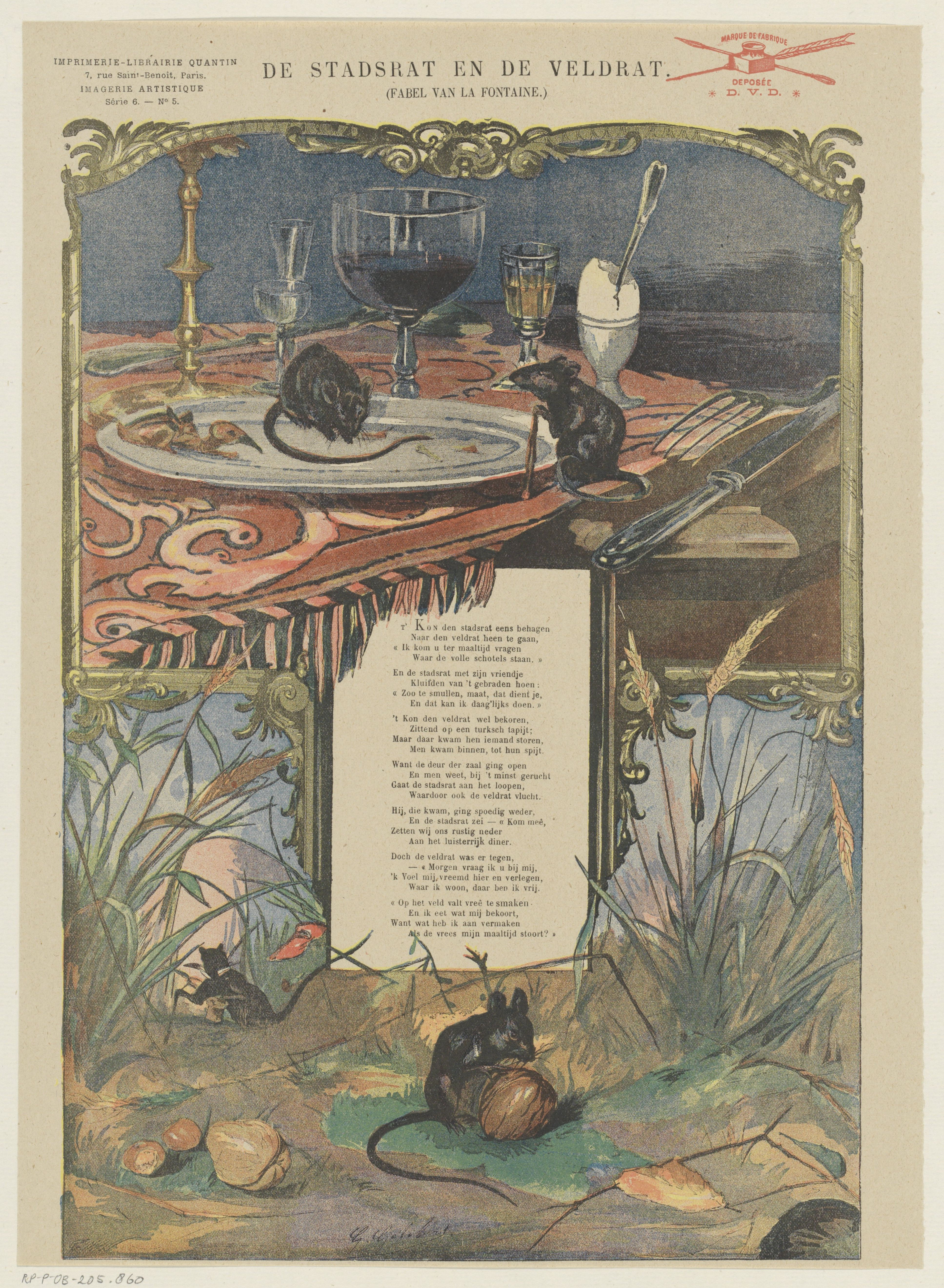 IdentificatieTitel(s): De stadsrat en de veldrat (titel op object)Fabel van La Fontaine (serietitel op object)Imagerie Artistique / Série 6 (serietitel op object)Objecttype: prent volksprent Serienummer: 5/20Objectnummer: RP-P-OB-205.860Opschriften / Merken: verzamelaarsmerk, verso, gestempeld: Lugt 2760octrooivermelding, recto rechtsboven, gestempeld: ‘marque de fabrique / deposée / * D.V.D. *’, rode stempel met inktpot, pen en schrijfveerOmschrijving: Blad met een grote voorstelling uit de fabel van Jean de La Fontaine, van de stadsrat en de veldrat. In het midden een tekstblok met een vers. Genummerd linksboven: Série 6. - No. 5.VervaardigingVervaardiger: ontwerper: Gaston Gélibert (vermeld op object)prentmaker: onbekend (vermeld op object)uitgever: Albert Quantin (vermeld op object)Plaats vervaardiging: ParijsDatering: 1876 - 1890 en/of 1888Fysieke kenmerken: kleurenlithografie en tekst in boekdrukMateriaal: papier Techniek: kleurenlithografie (procedé) / boekdrukAfmetingen: blad: h 366 mm × b 268 mmOnderwerpWat: fabelsrodents: ratVerwerving en rechtenCredit line: Schenking van de heer F.G. Waller, AmsterdamVerwerving: schenking 1923Copyright: Publiek domein